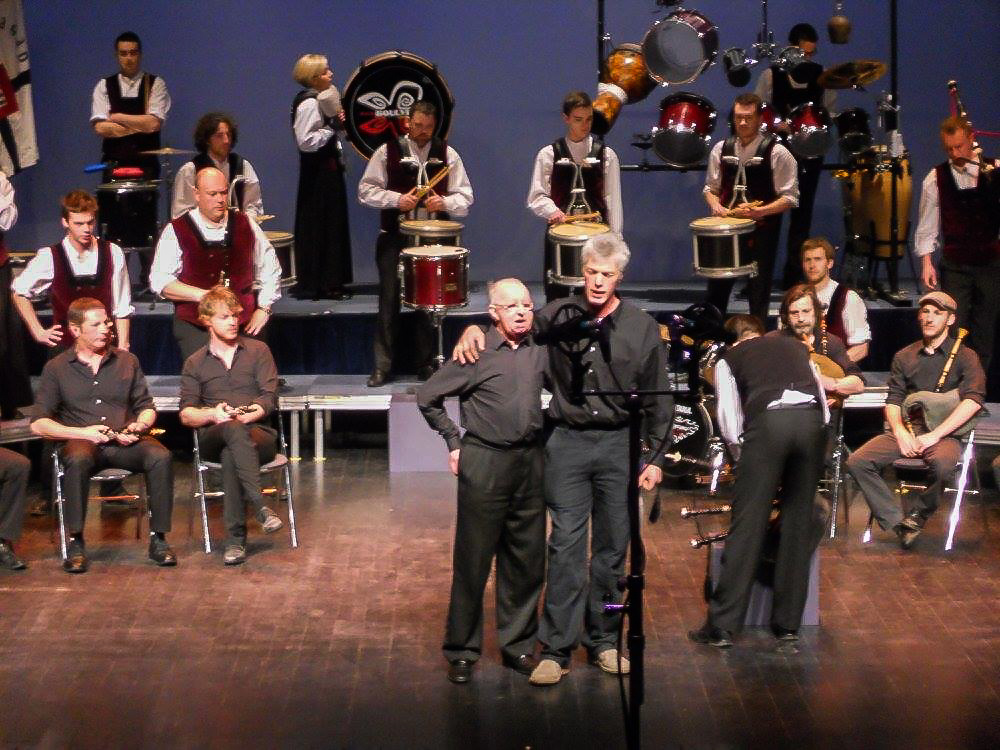 Épreuve d'hiver du Championnat national des bagadoù de Deuxième catégorie organisée à L'Hermine à Saint-Brieuc le 13 mars 2016.